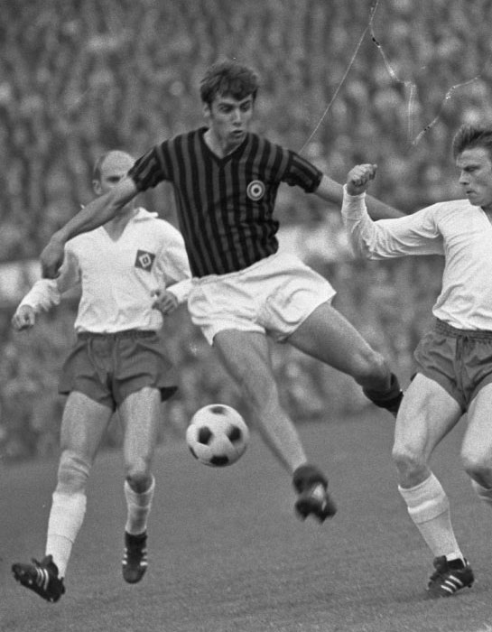 Europacup II finale 1968 tussen HSV en AC Milan. Pierino Prati.